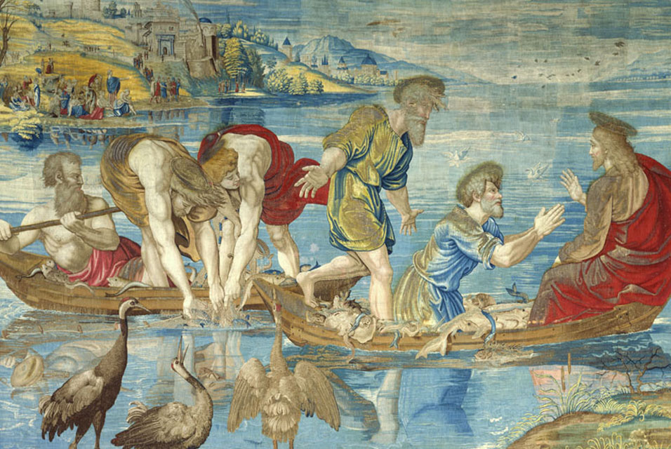 Sur une peinture de Rapahel,une tapisserie de Pieter van Aelst faite à Bruxelles. Tapestry Musei Vaticani, Rome